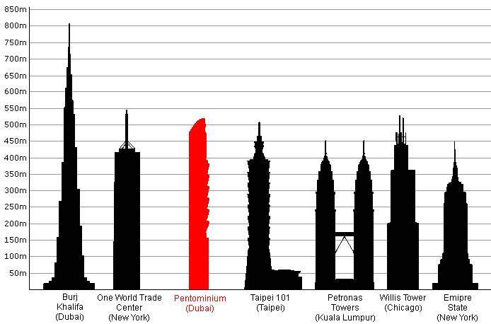 Tallest Buildings